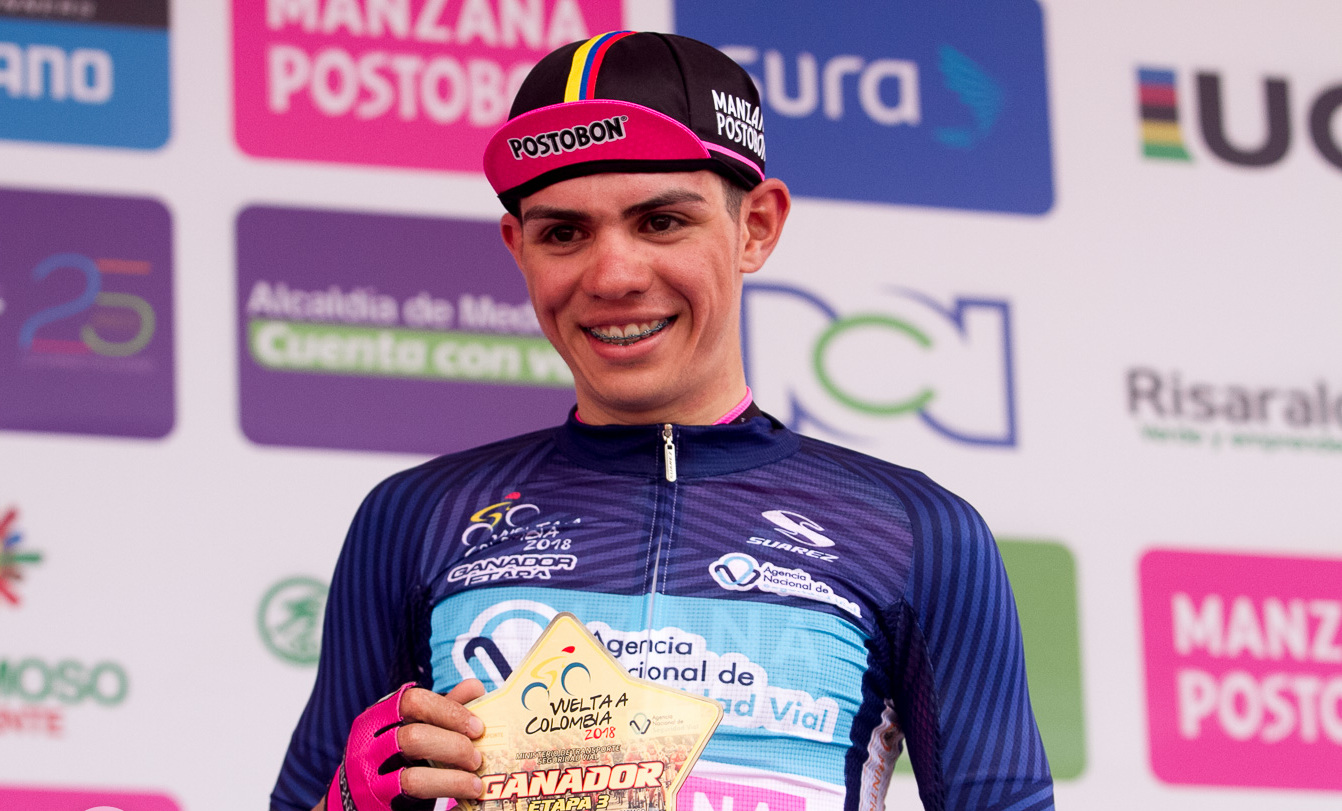 3.ª Etapa de la Vuelta a Colombia 2018 - Ciclista Sergio Higuita - Podio ganador de etapa.